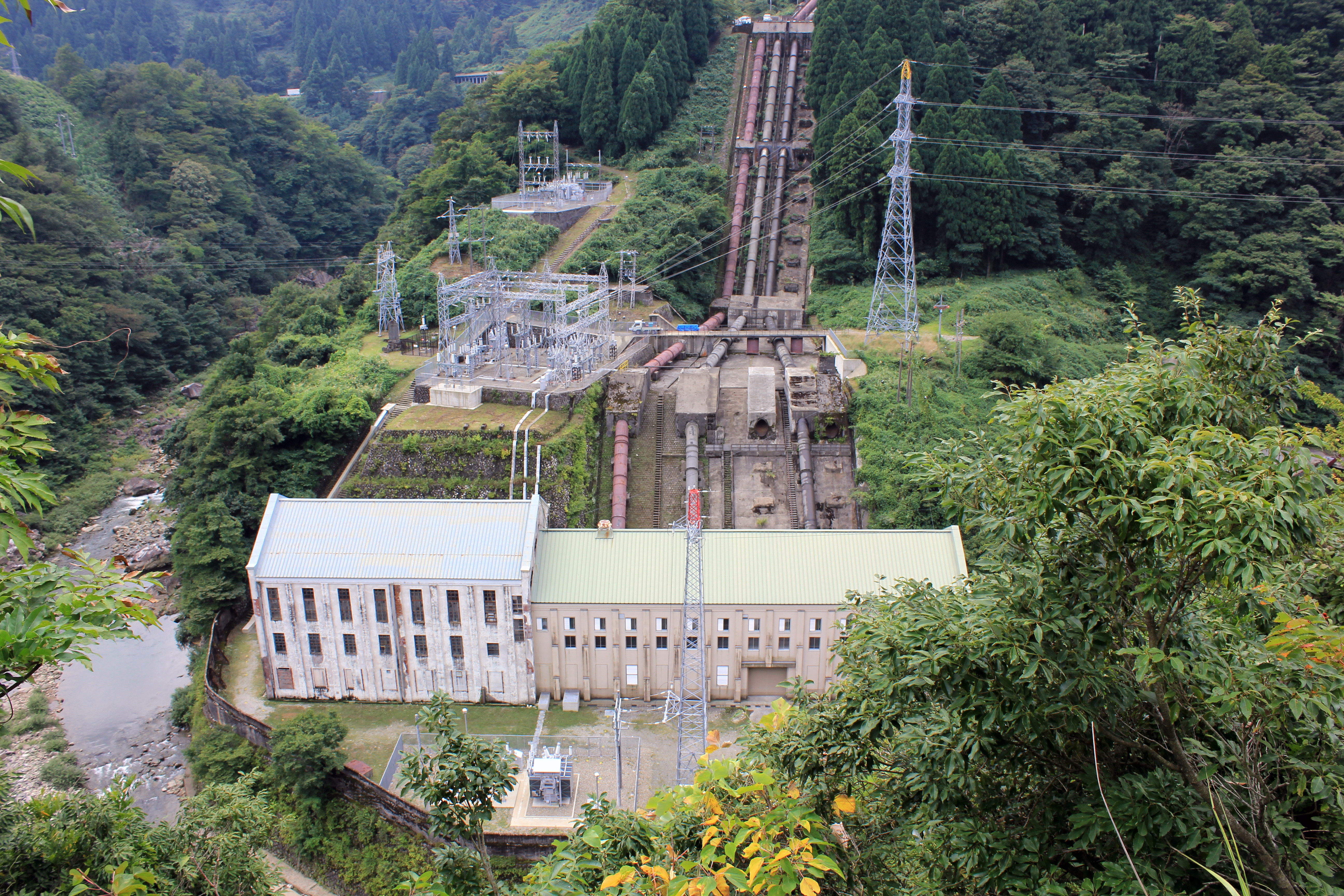 西勝原第一発電所（福井県・九頭竜川。北陸電力株式会社管理）